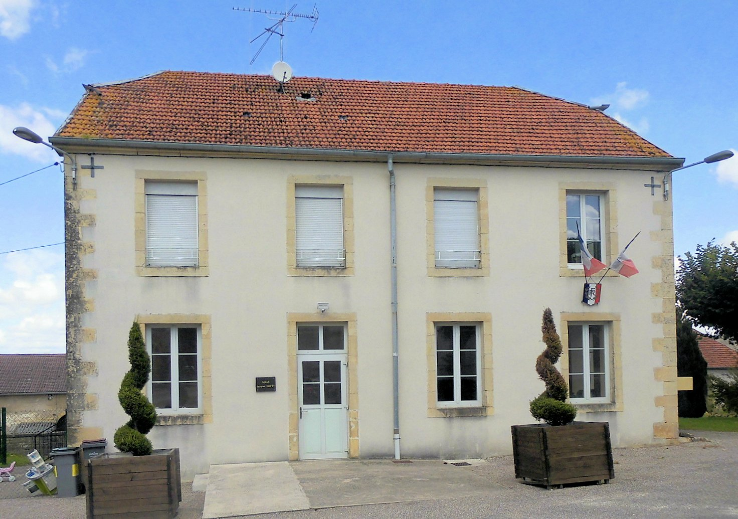 La mairie de Saponcourt